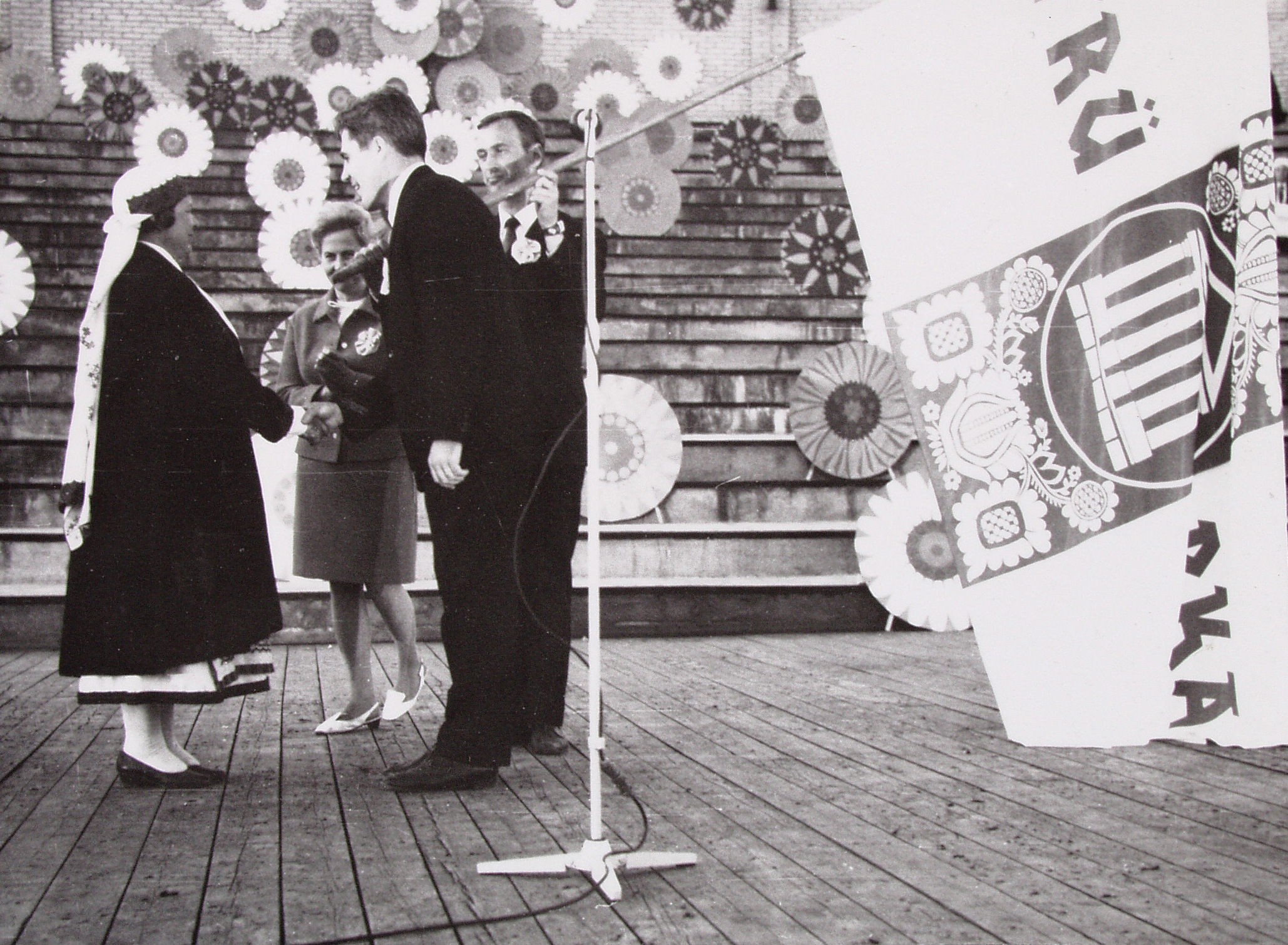 TRÜ RKA lipu üleandmine Helju Mikkelile.